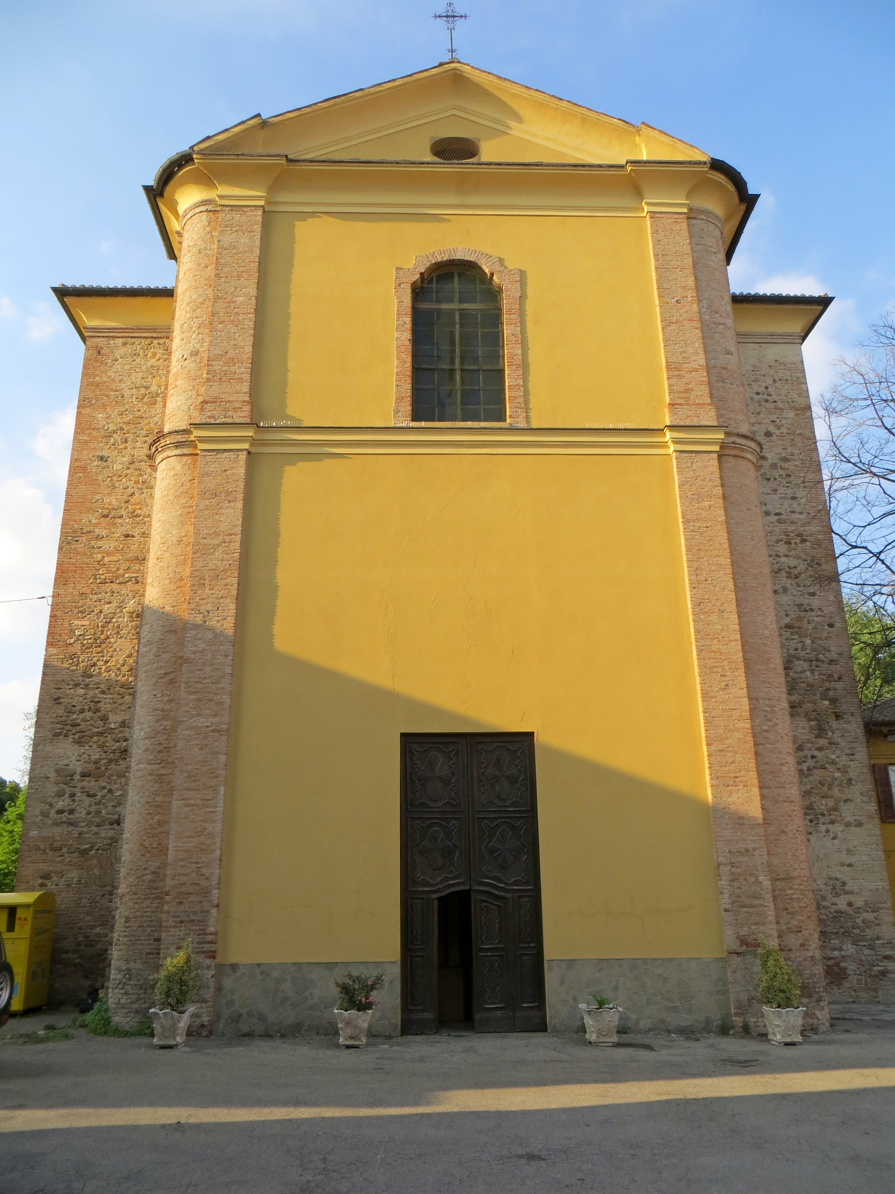 Chiesa di San Prospero (San Prospero Parmense, Parma) - facciata